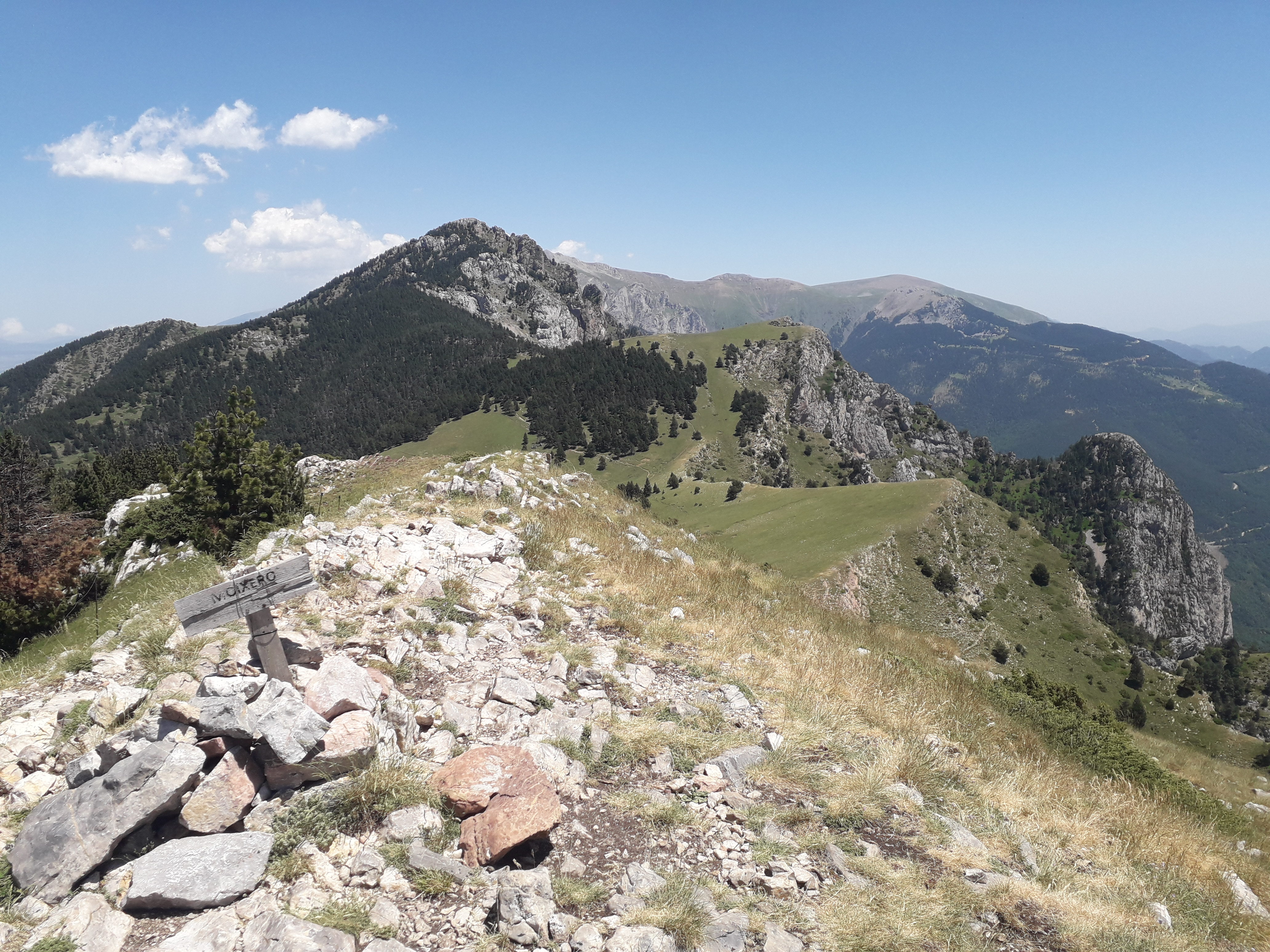 Pic del Moixeró i les vistes del vessant Est amb les Penyes Altes del Moixeró i el Puigllançada.